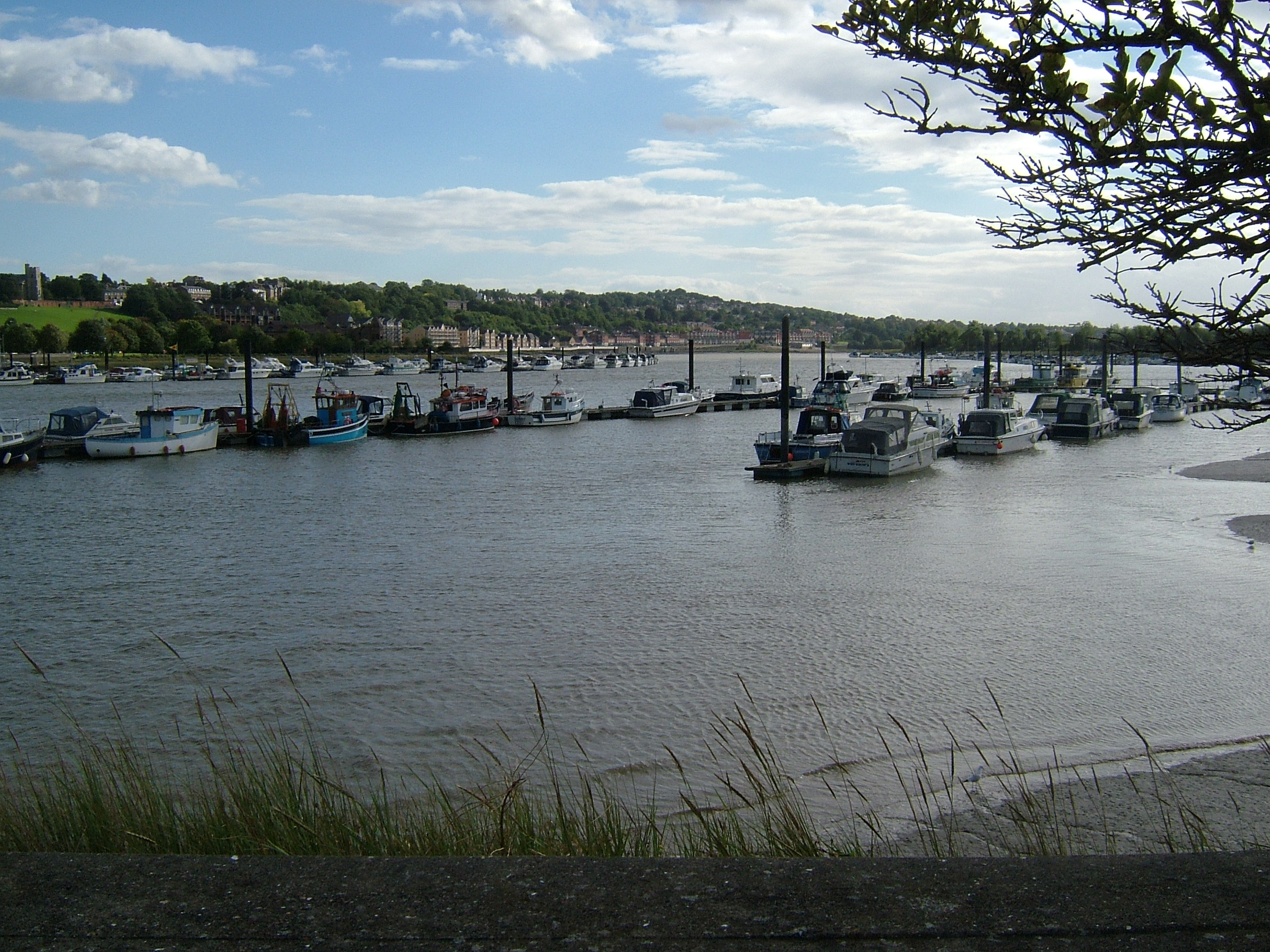 Rochester